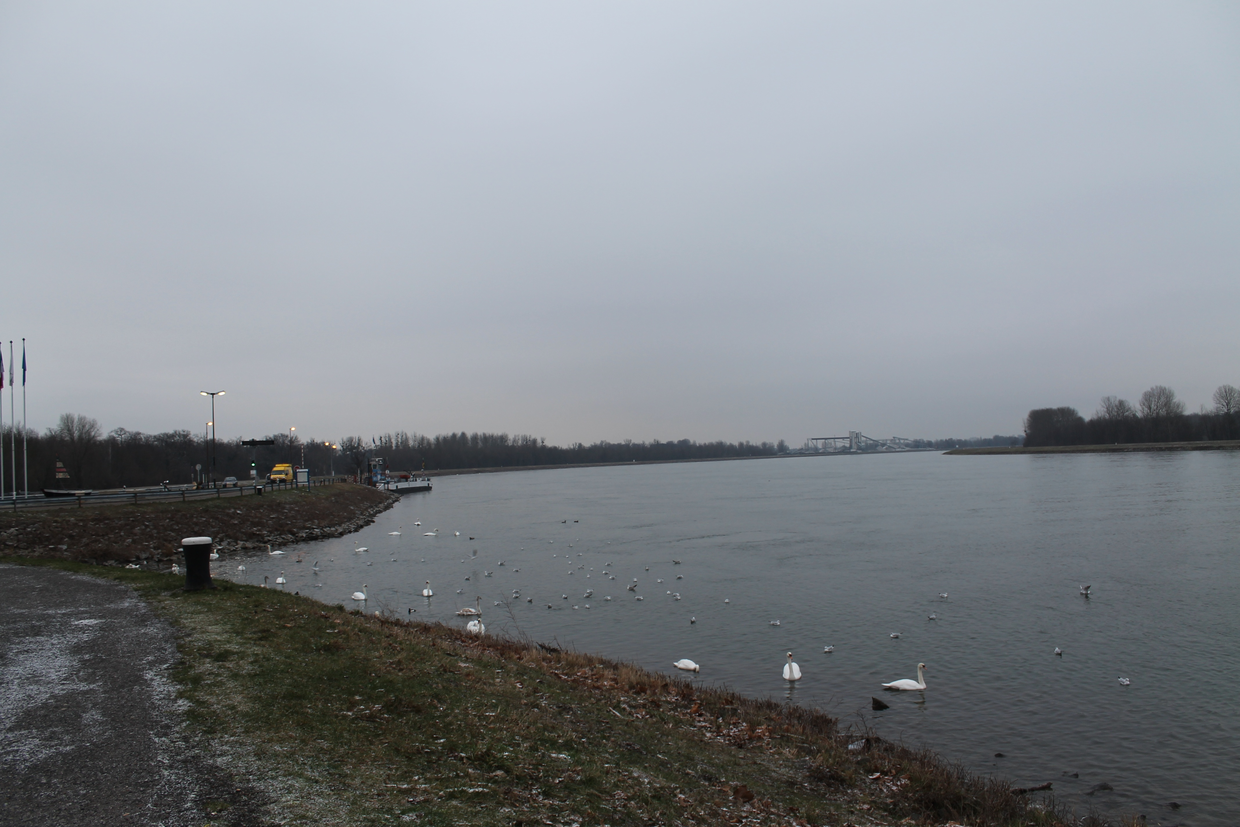 Drusenheim